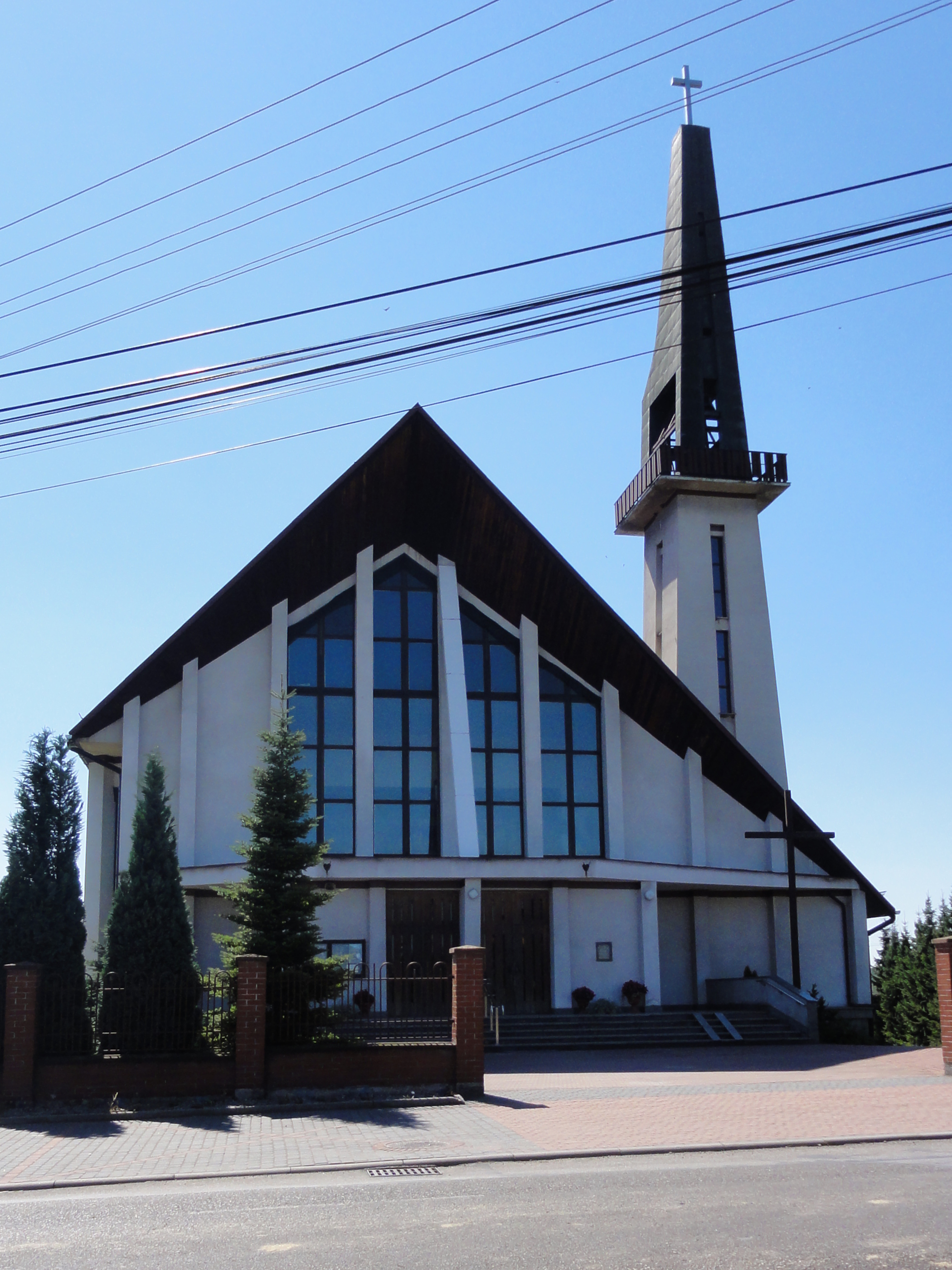 Kościół św. Józefa Robotnika w Janowicach